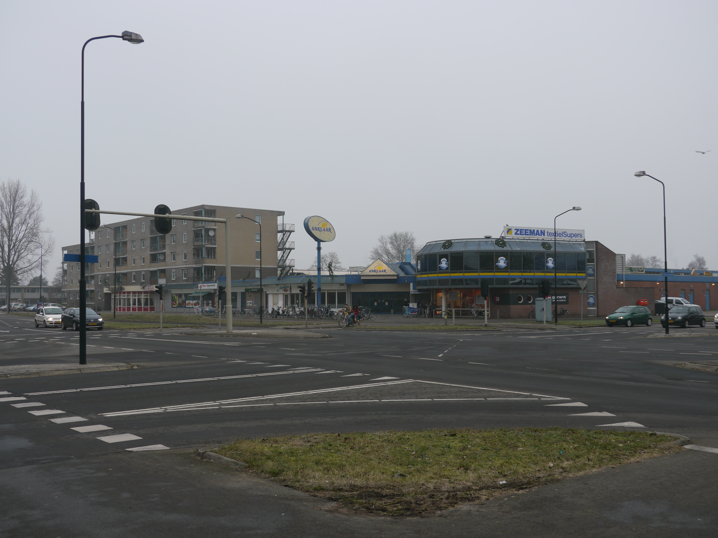 Het oude winkelcentrum Anklaar in Apeldoorn, zoals dat er tot 2015 was. In dat jaar werd het afgebroken om plaats te maken voor een nieuw centrum.